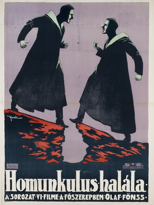 ungarisches Premierenplakat zu Homunculus 6 (Das Ende des Homunculus) von Otto Rippert